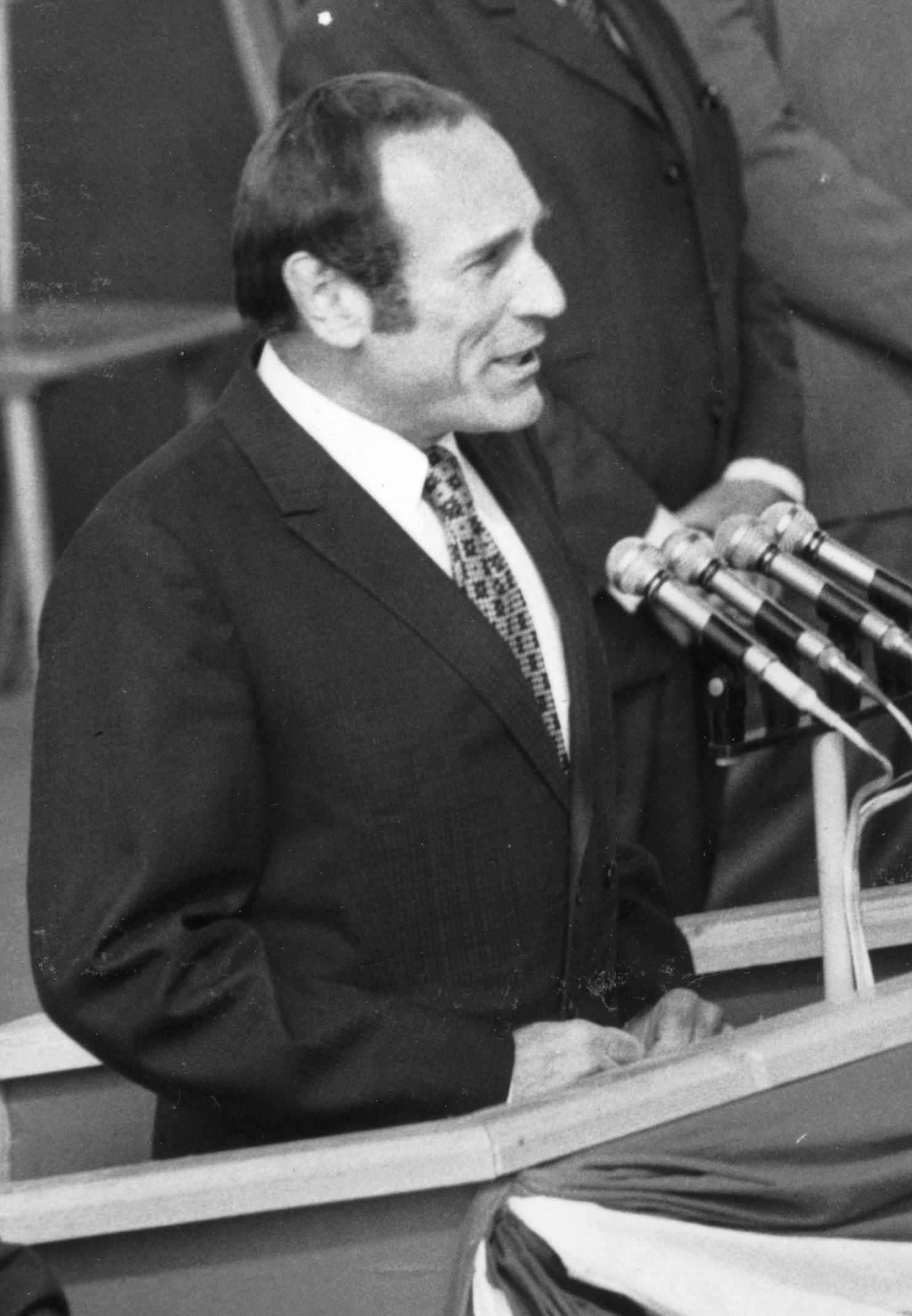 Bánffy György színművész